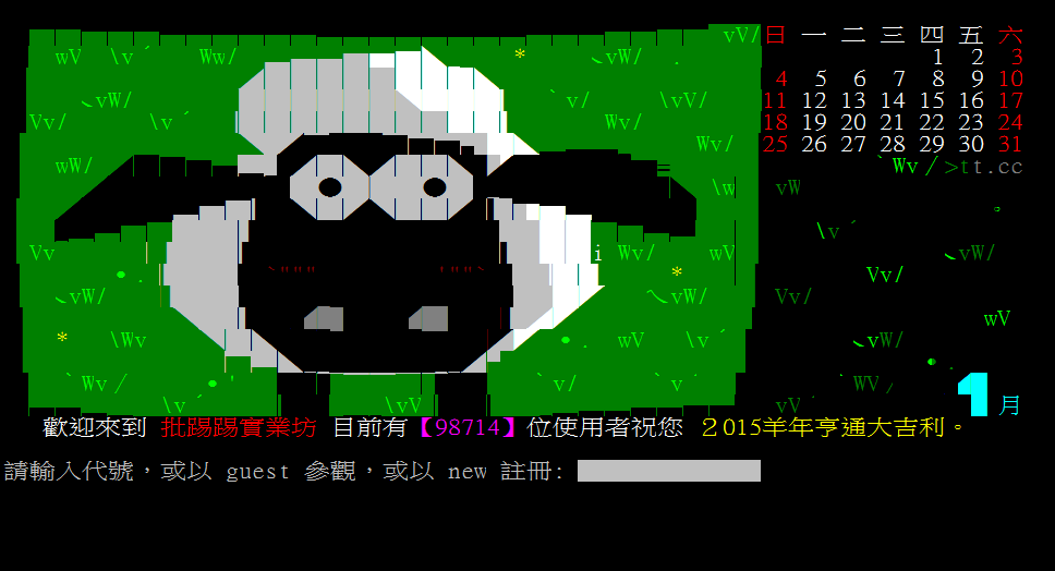 PTT1月4日進站畫面